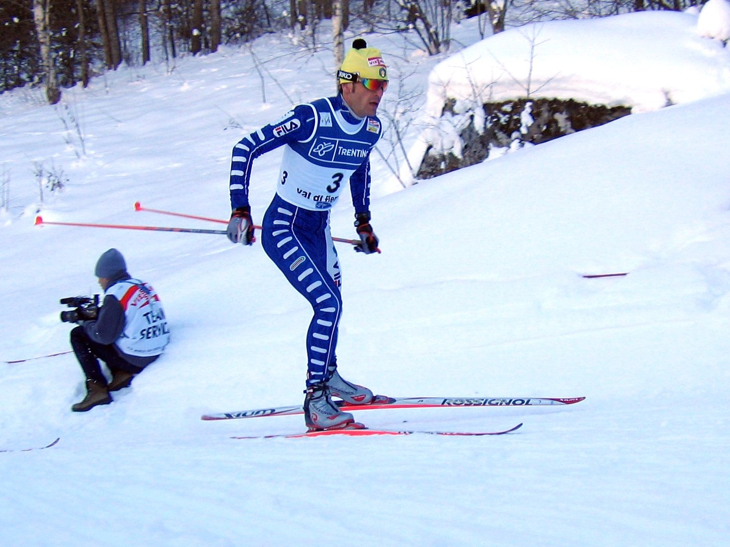 Italian skier Pietro Piller Cottrer.